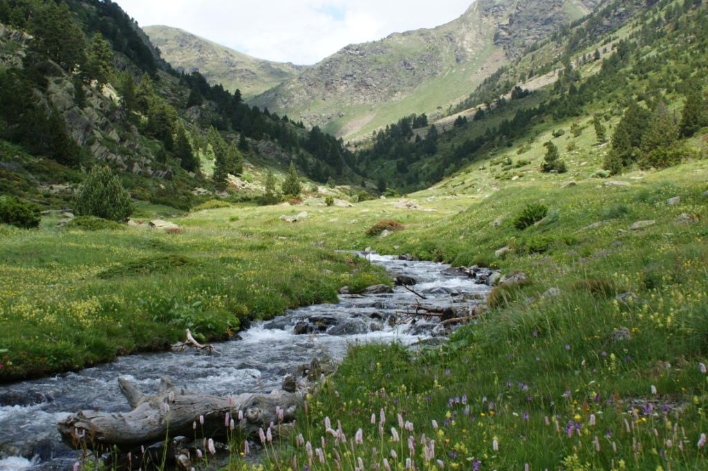 El Rialb This is a a photo of a river in Andorra with id: IEA-R-50